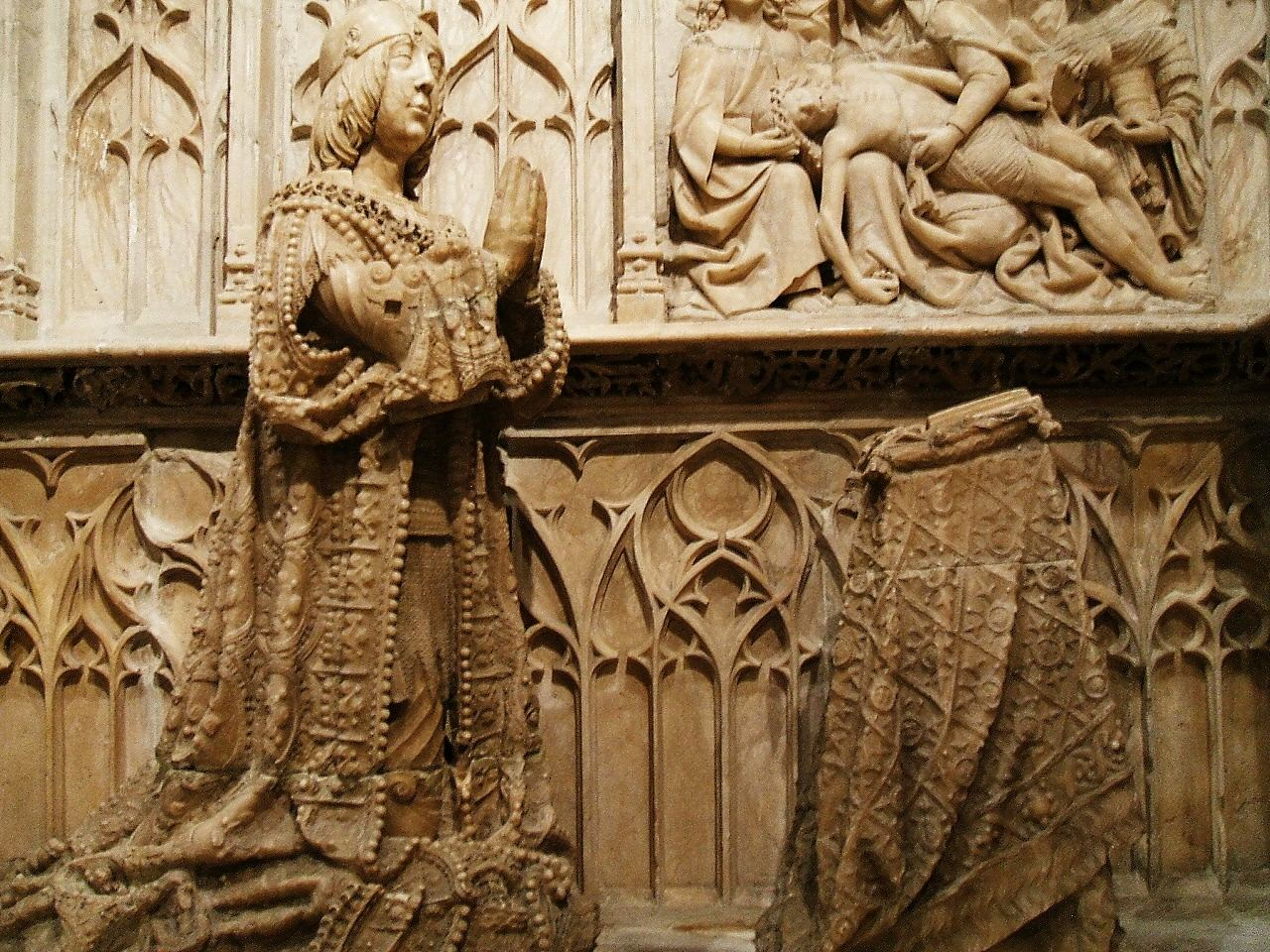 Sepulcro de Don Juan de Padilla, obra en alabastro de Gil de Siloé (siglo XIV), procedente del Monasterio de Fresdelval y hoy en el Museo de Burgos